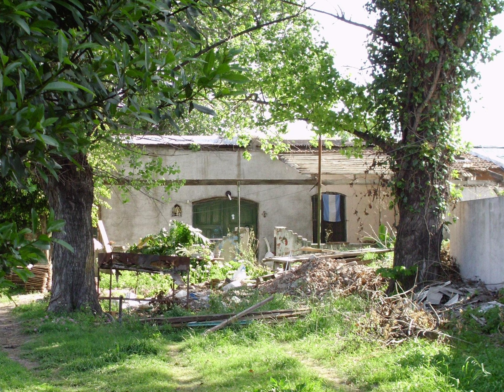 Chacra de los Marquez Marquez, Villa Adelina, octubre de 2011